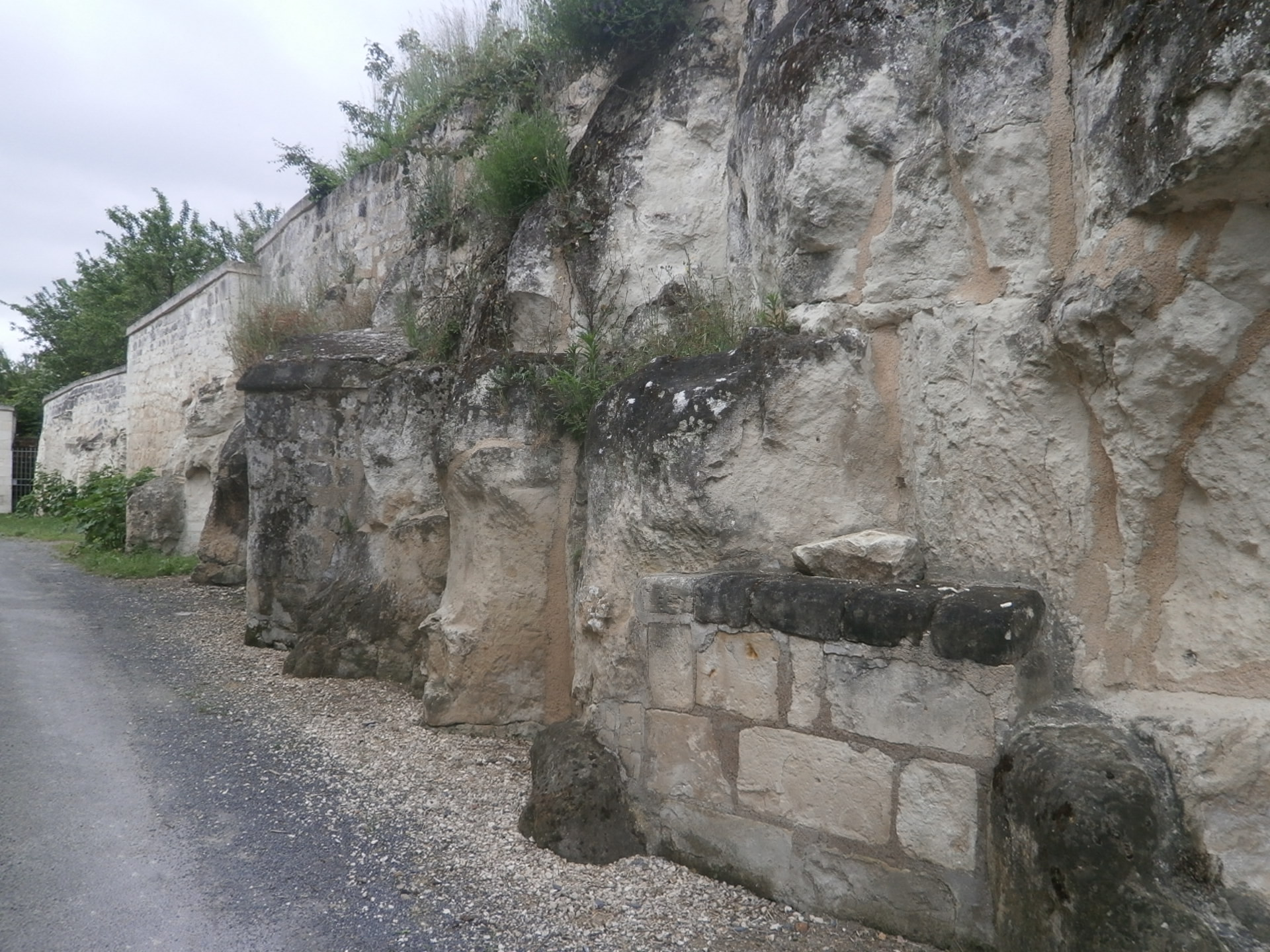 La rue des Perrières (anciennes douves de Candes)